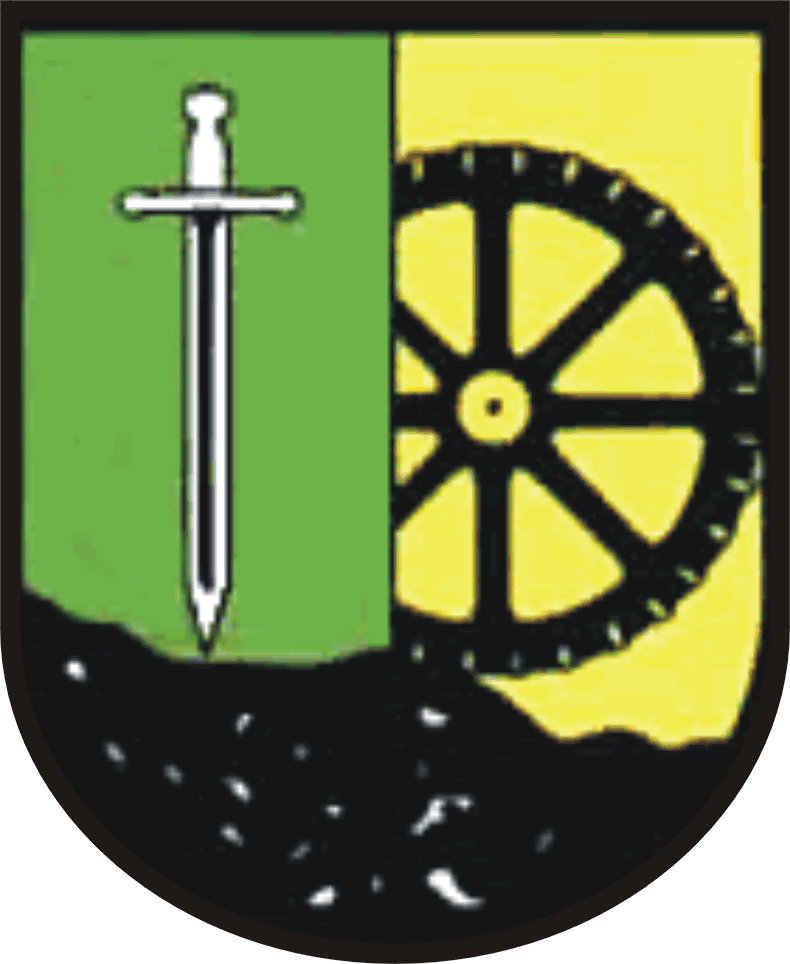 Herb Zagórza - miasta w latach 1967 - 1975 (obecnie dzielnica Sosnowca)